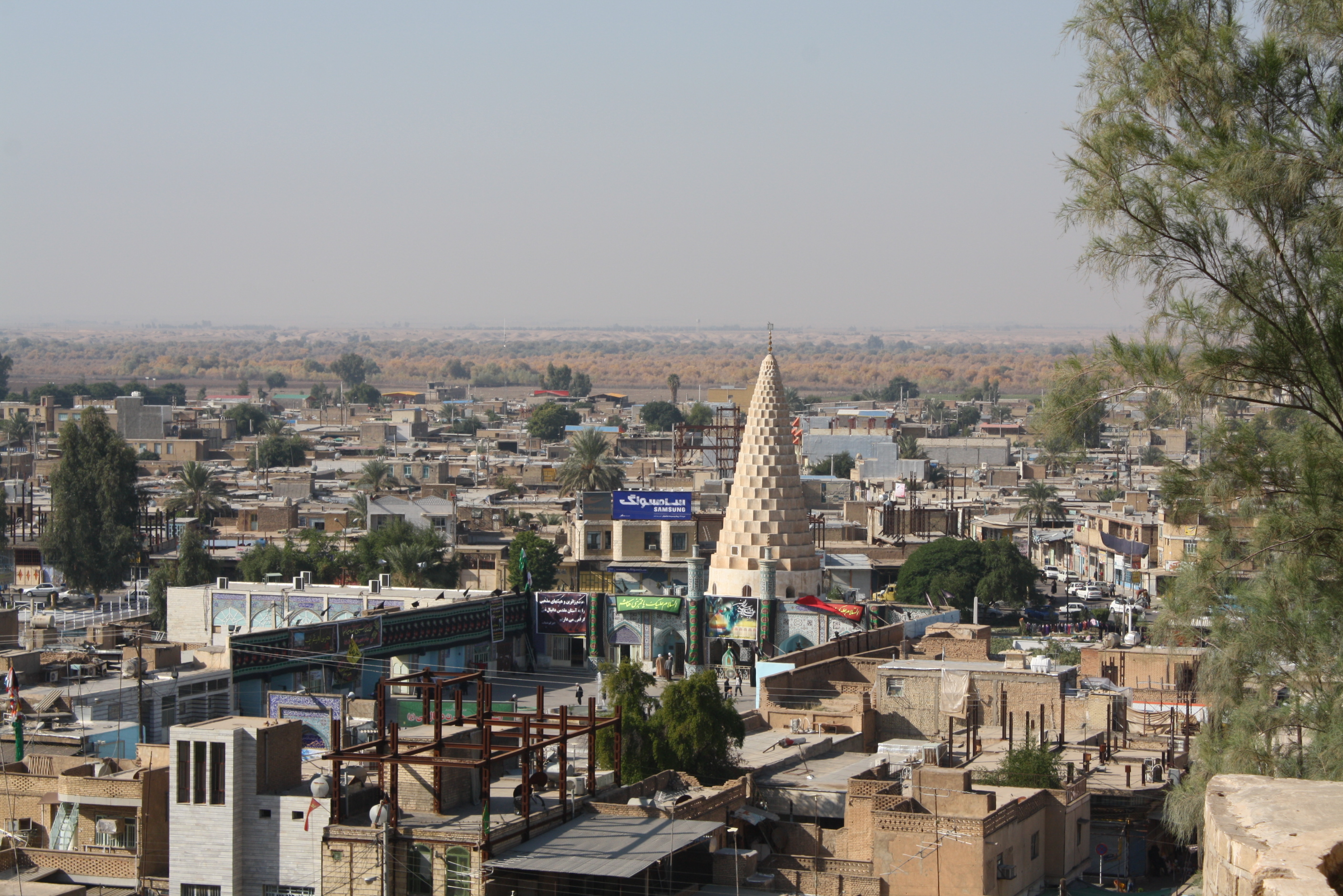 Панорама г. Шуш (Сузы), Иран. Вид с Французской крепости.